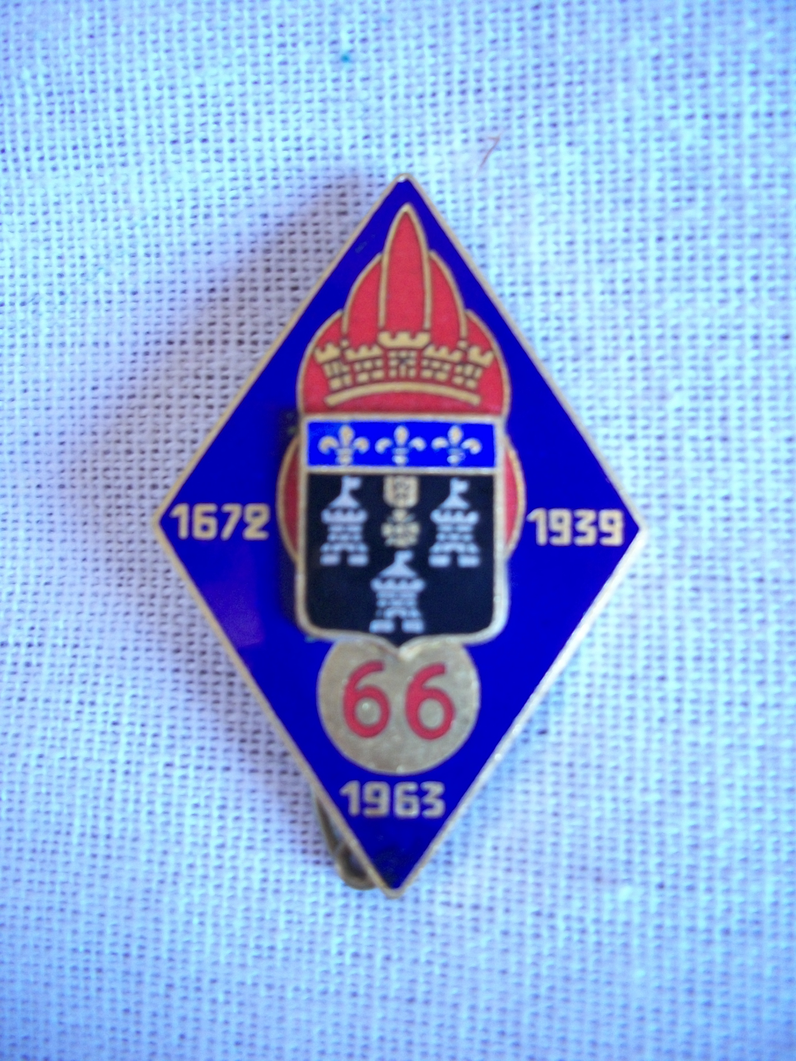 Insigne de 1963 date de recréation du régiment.